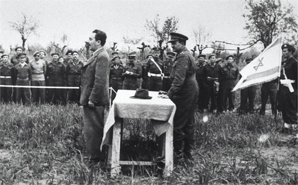 איטליה - מר שרת בטקס הנפת הדגל של הבריגדה היהודית